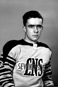 Norman "Odie" Lowe cirac 1946-47.